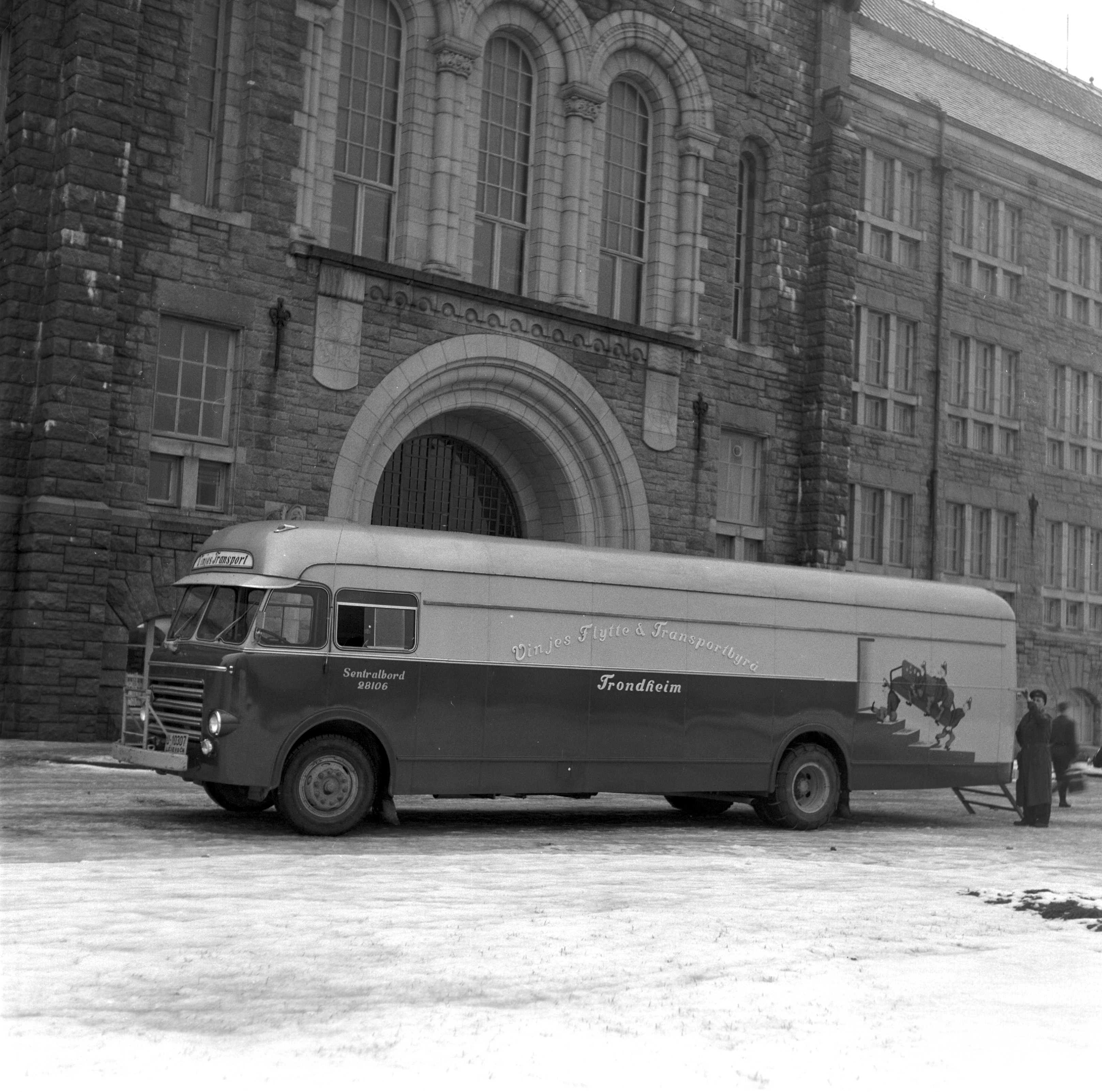 Vinjes Flytte & Transportbyrå, Trondheim. Bussen står parkert utenfor hovedbygget på NTNU, Gløshaugen. Vinjes Transport A/S ble grunnlagt 1889 som vognmannsforretning av Anton P. Vinje. Firmaet driver idag bilverksted, Norges eldste flyttebyrå, ambulansetjenste i Trondheim siden 1920 og ambulansetjeneste i Orkdal siden 2005.